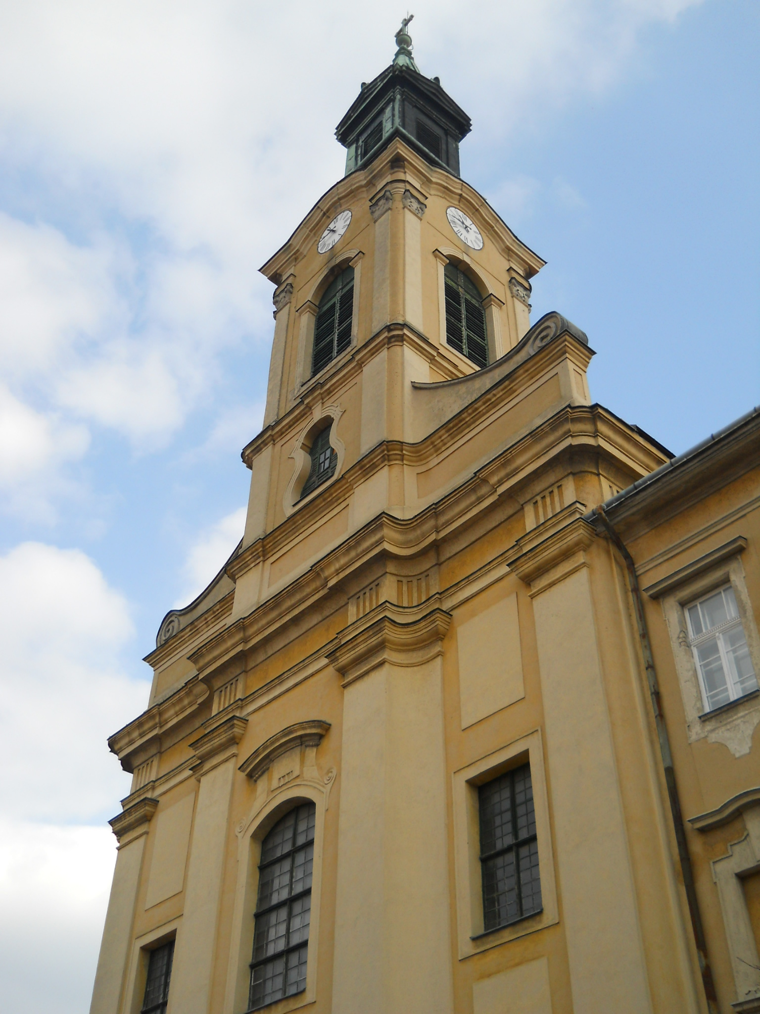 Székesfehérvár - Kármelhegyi Boldogasszony-templom